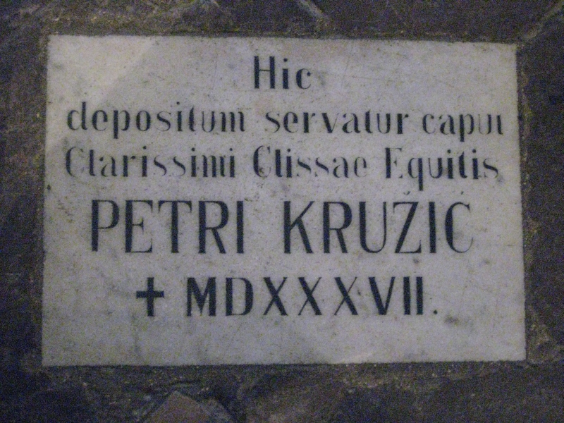 Ploča Petra Kružića u crkvi Gospe Trsatske, Rijeka, Croatia